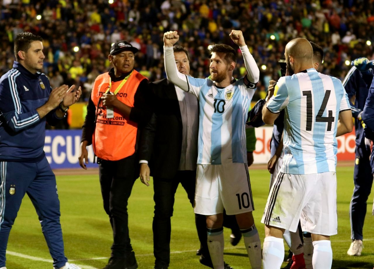 Quito, 10 oct (Andes).- Con tres tantos Argentina espantó los fantasmas de la eliminación, clasificó a su décima octava Copa del Mundo y venció 3-1 a un Ecuador que inició ganando el compromiso, disputado en el estadio Atahualpa de Quito, pero que no supo contener a uno de los mejores jugadores del mundo. ANDES/Micaela Ayala V.